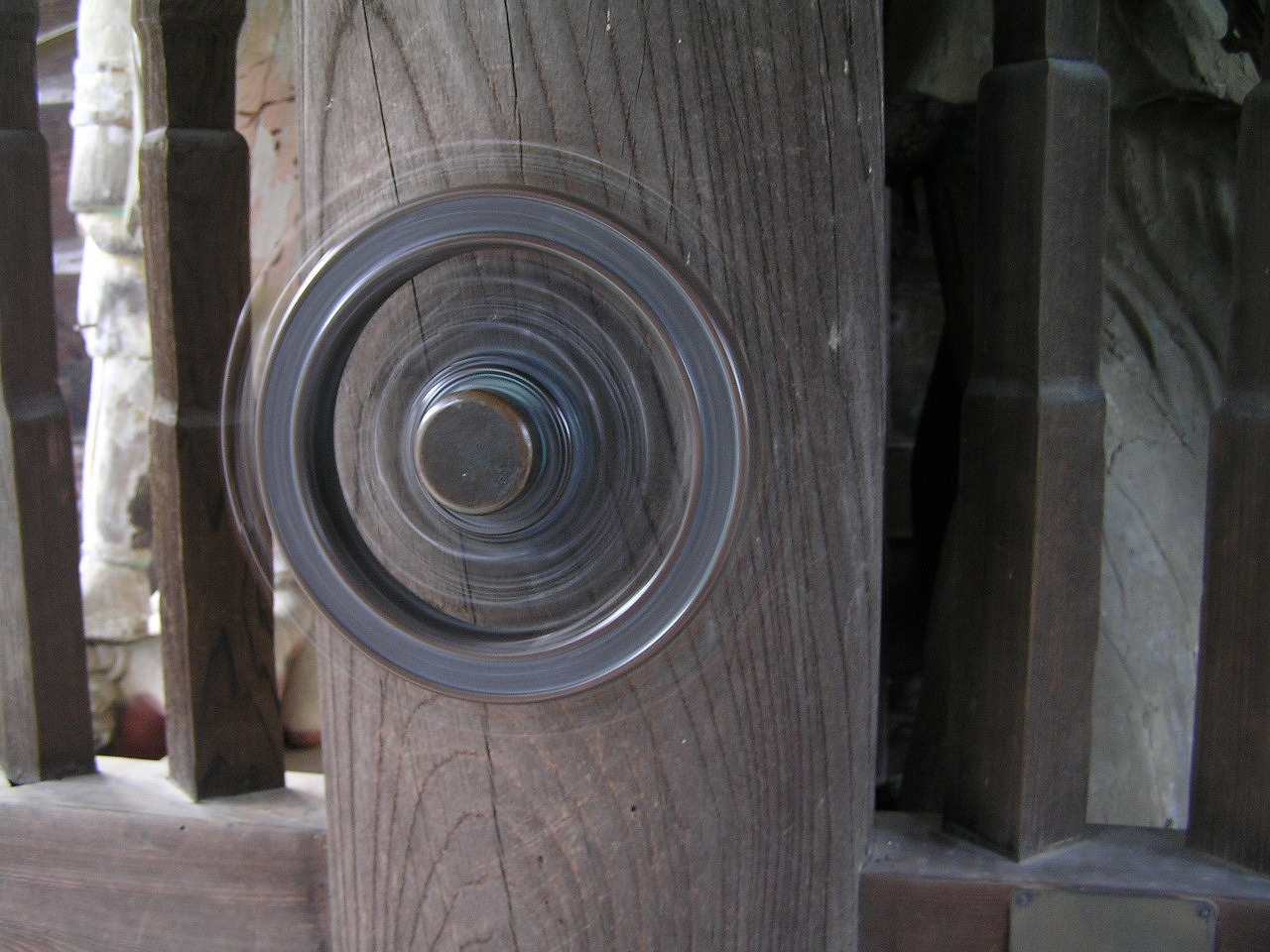 転法輪（西脇市西林寺）山門